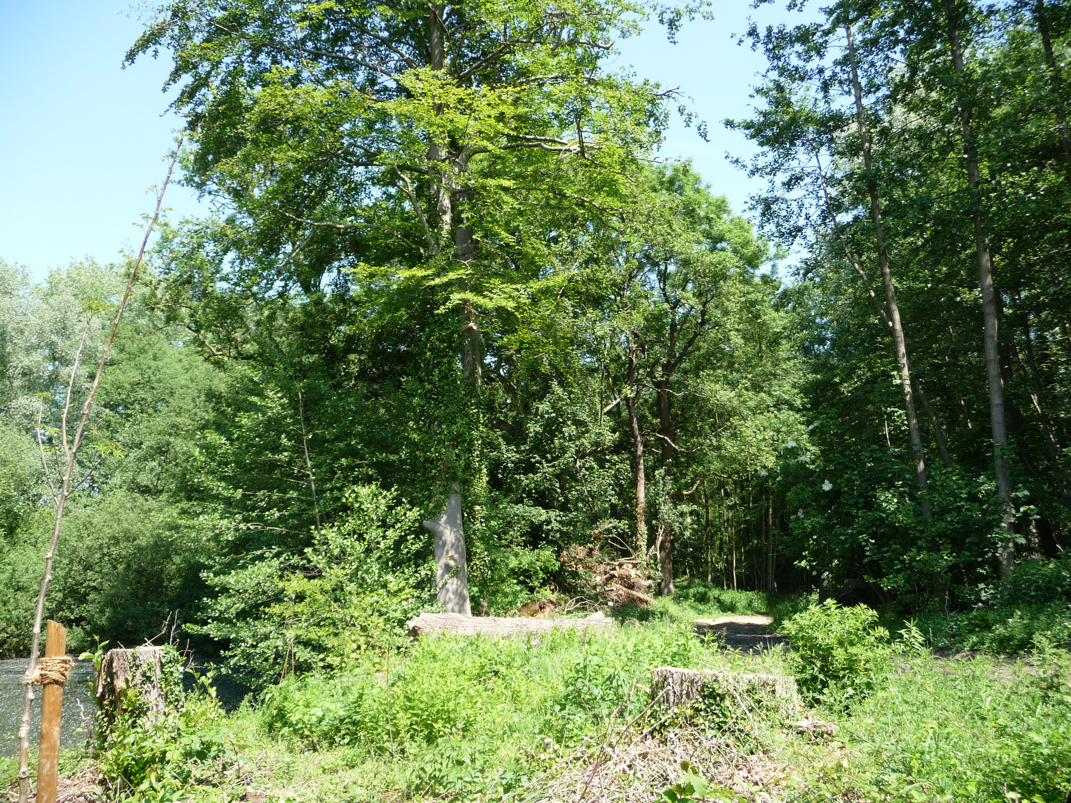 Ein reizvolles kleines Schutzgebiet mit Wald, einem Teich, einem Bach im Wald, sehenswerten Bäumen und hügeligen Waldwegen.